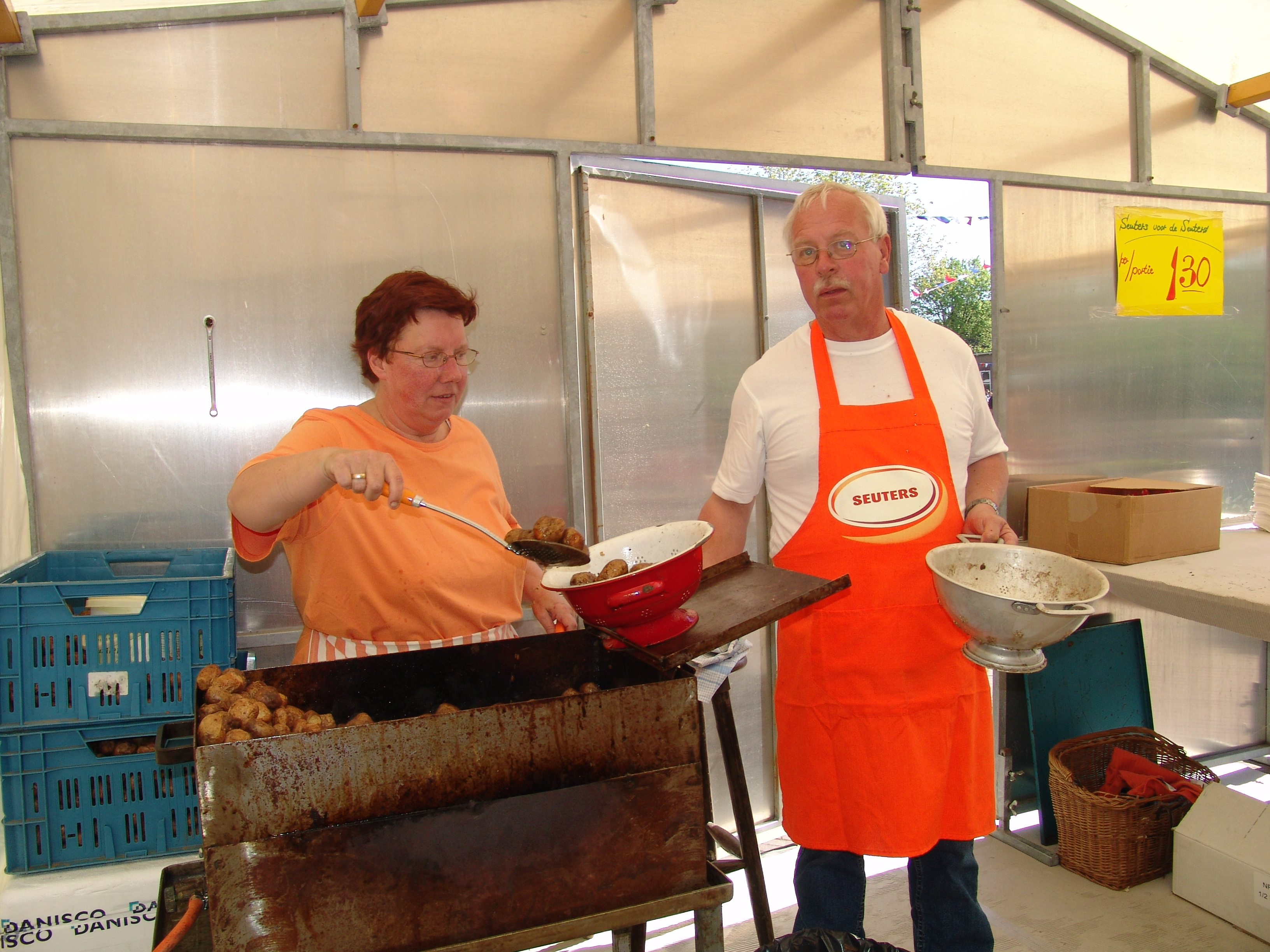 Seuters in de maak te 's-Gravendeel